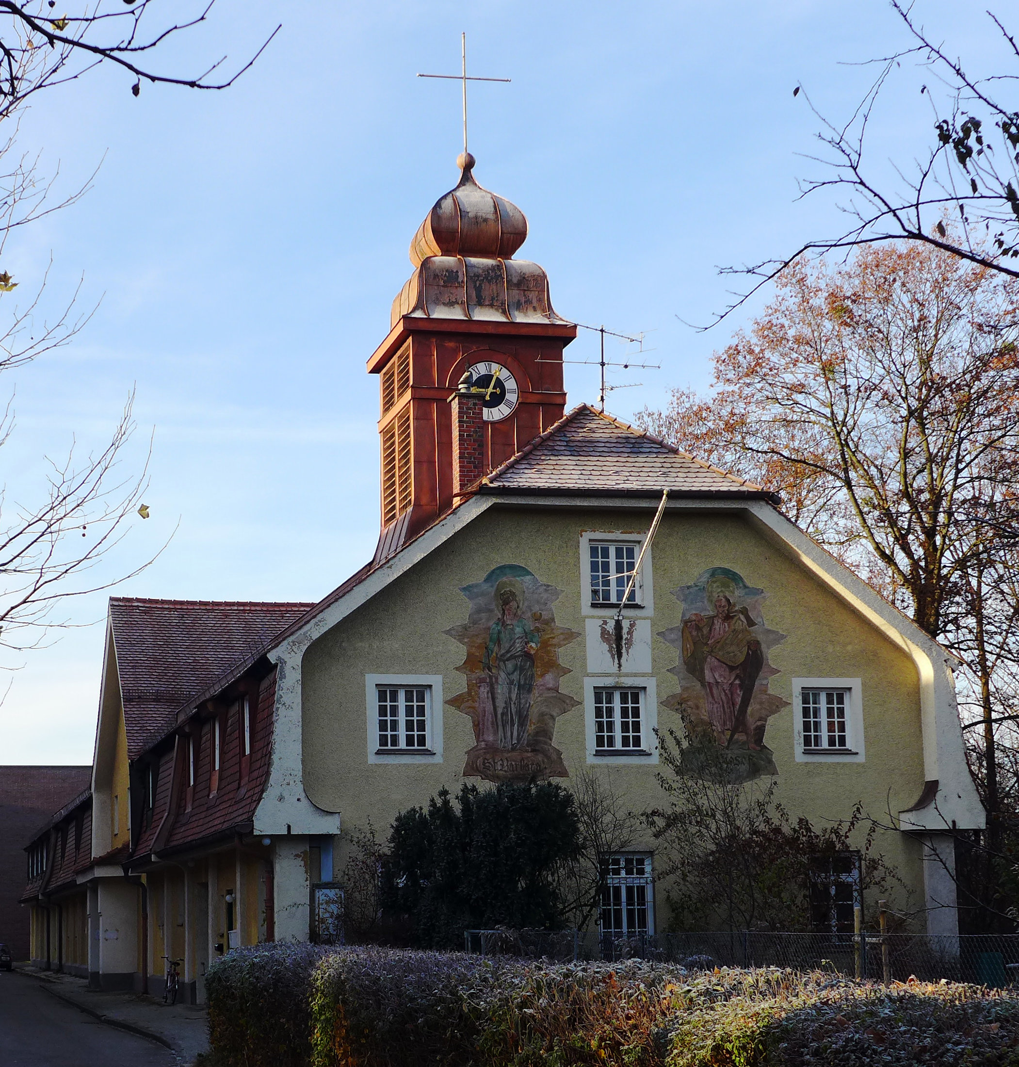 Kirche St. Barbara, Infanteriestr. 15, München